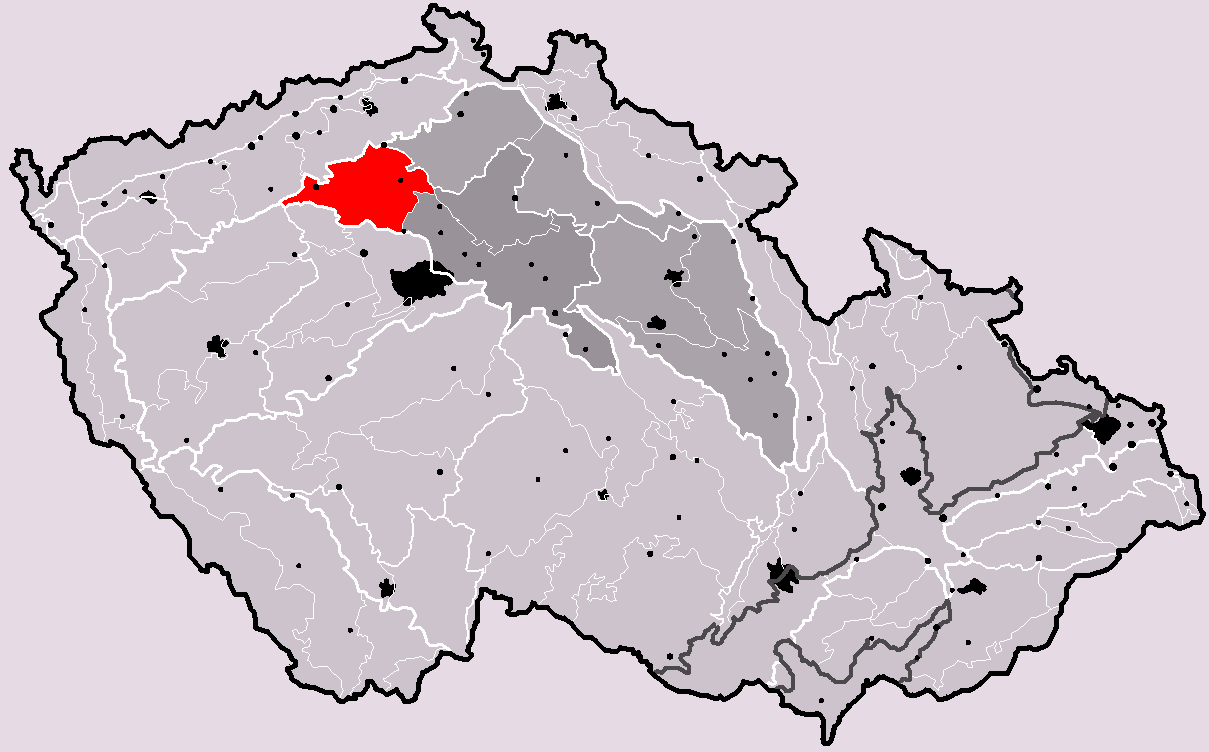 Poloha geomorfologického celku Dolnooharská tabule v rámci České republiky. Hercynský systém Hercynská pohoří I Česká vysočina I6 (VI) Česká tabule I6B (VIB) BStředočeská tabule I6B-1 (VIB-1) Dolnooharská tabule